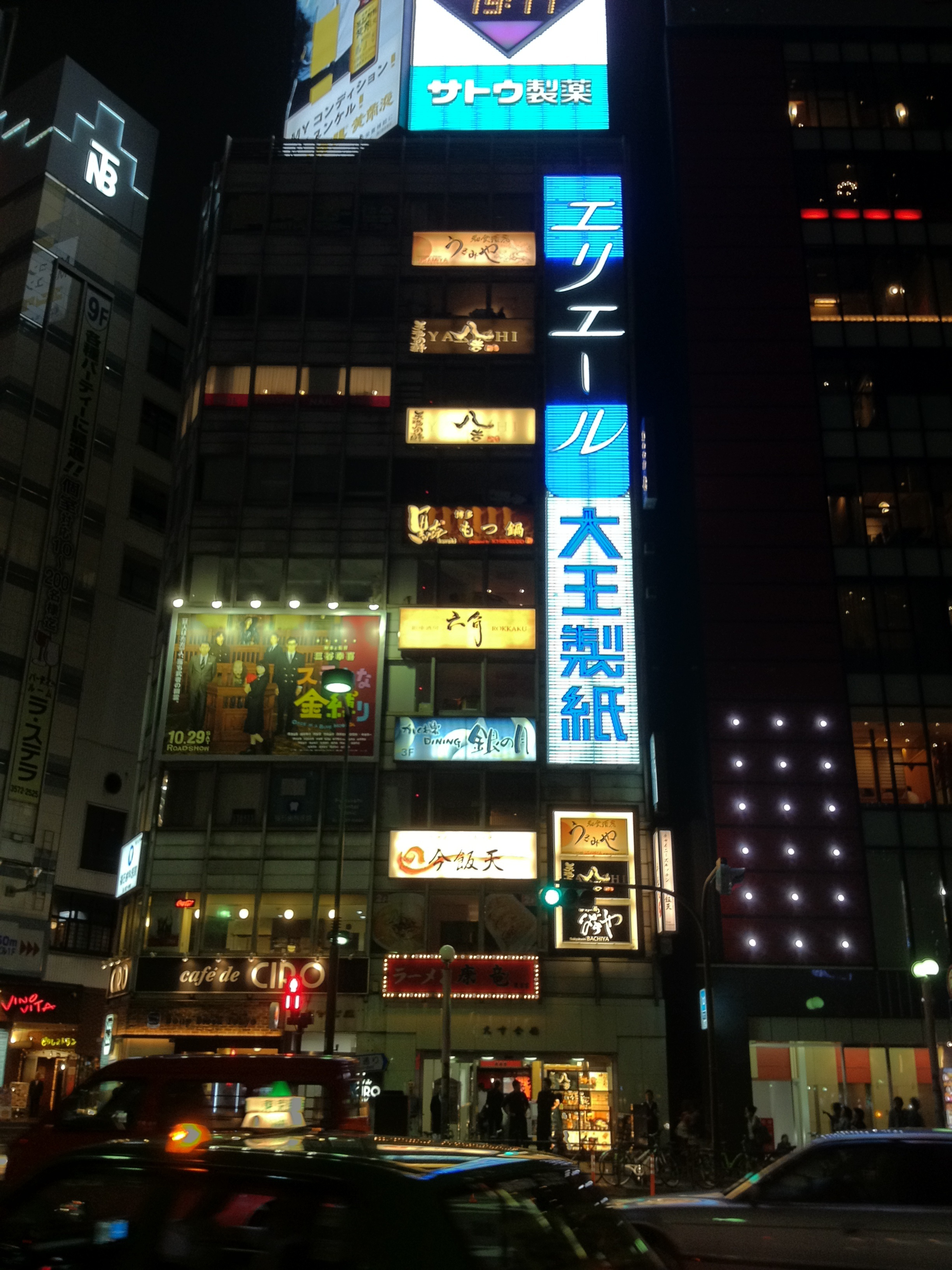 九重会館 ステキな金縛り